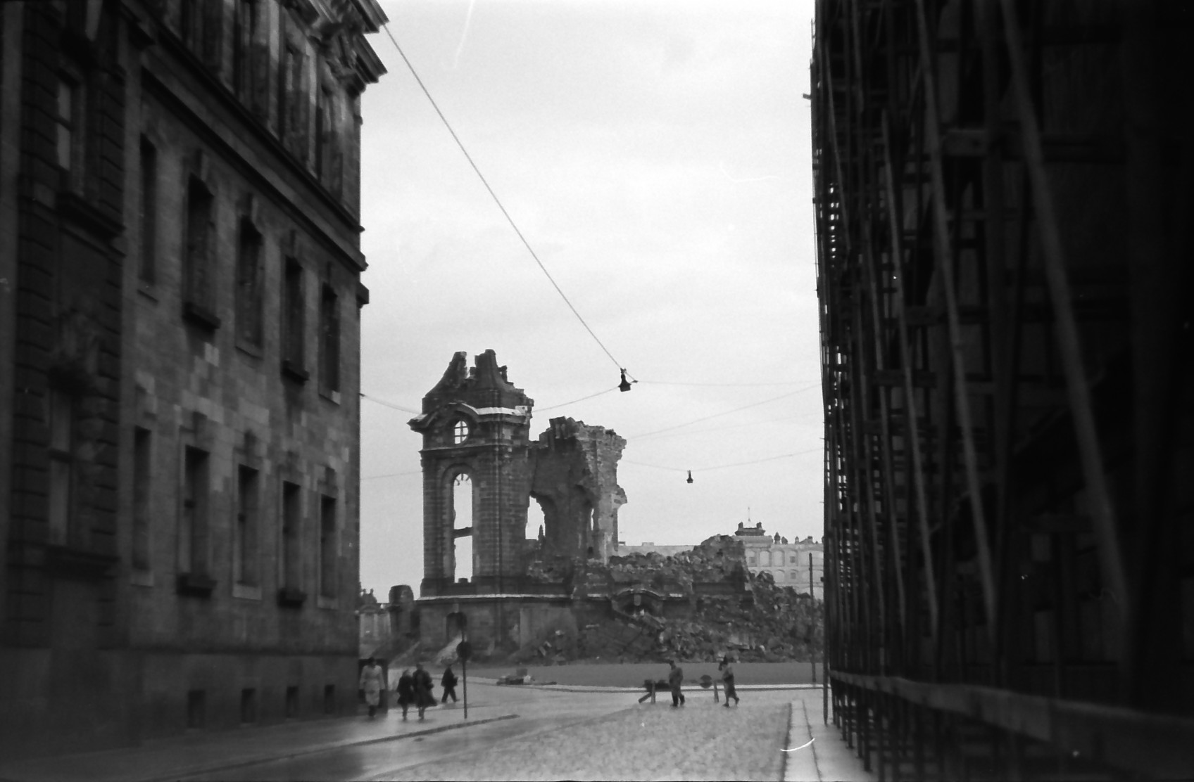 1957 oder 1958: Blick aus der Augustusstraße zur Ruine der Frauenkirche, links die Ruine des Schlosses